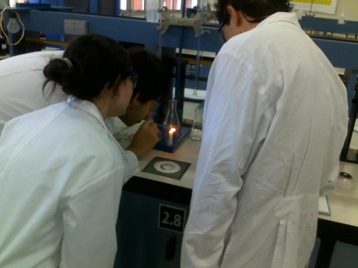 Trabajando en laboratorio de Quimica